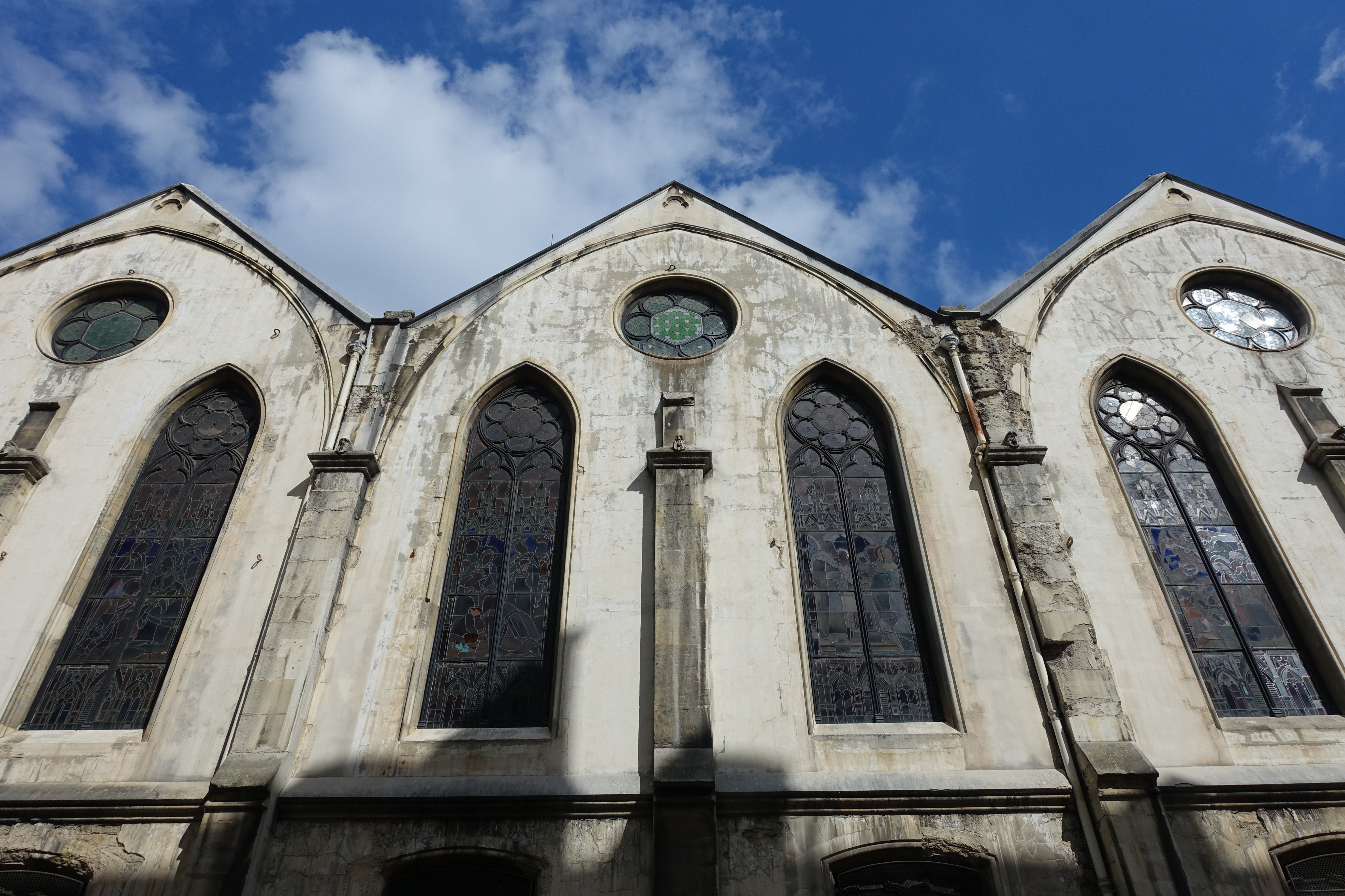 Eglise Saint Eugène Sainte Cécile @ Paris